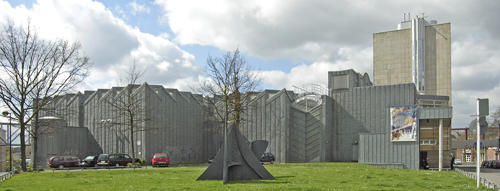 Beschreibung: Mönchengladbach, Museum Abteiberg, Seitenansicht Quelle: 07.04.2005 Fotograf: Hans Peter Schaefer Url: Lizenz: GNU FDL